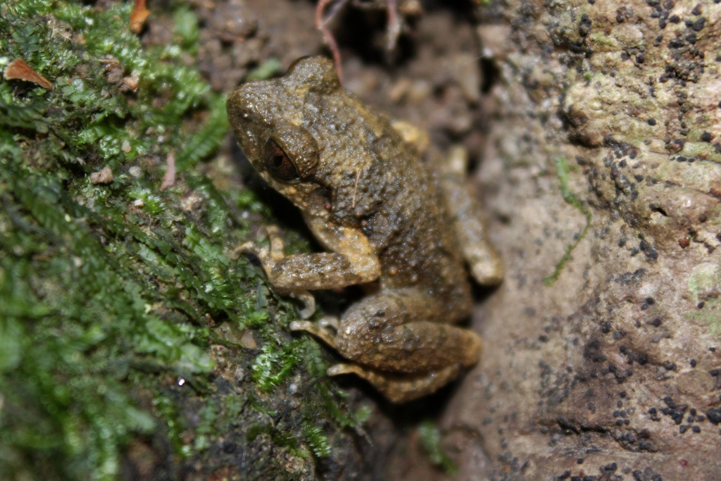 Taken in Tai Po Kau.